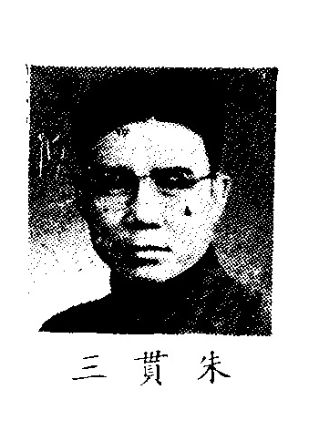 中文（中国大陆）: 制憲國民大會代表